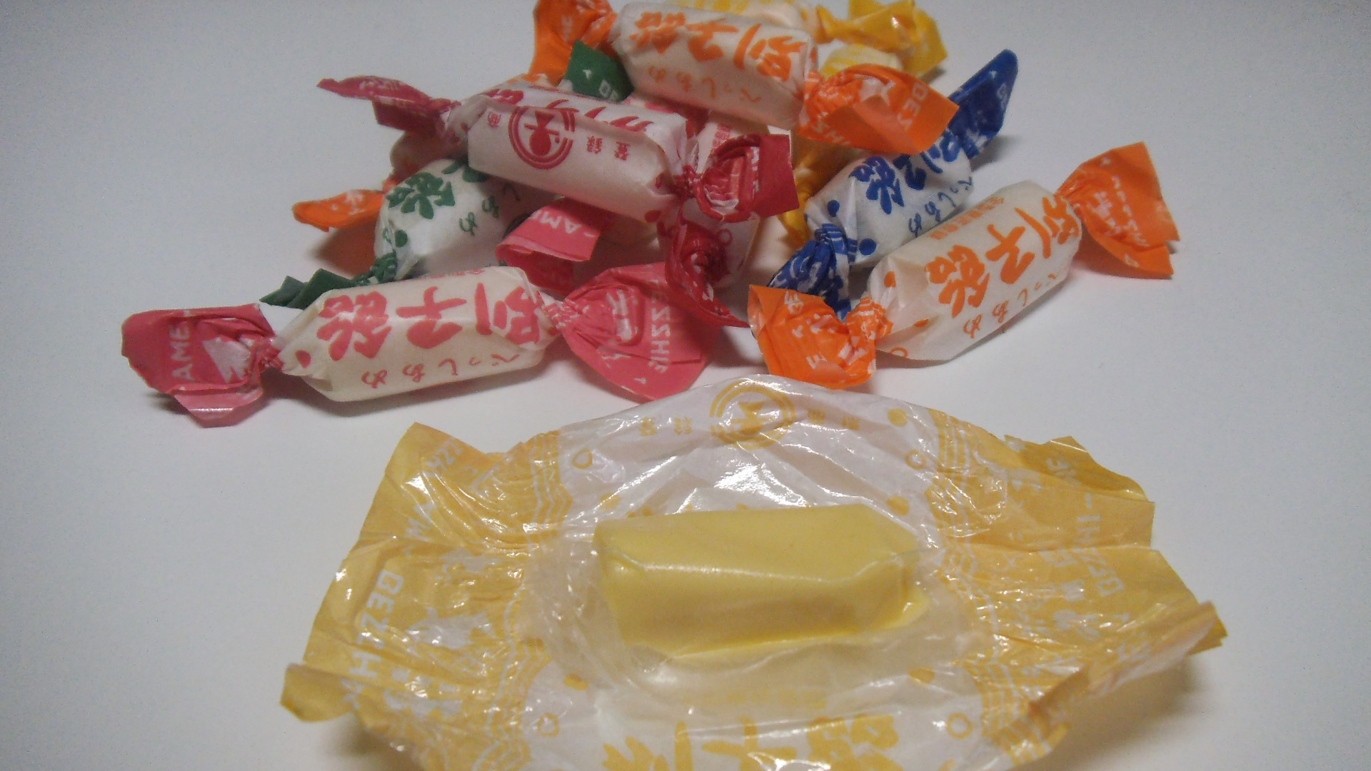 別子飴の画像。